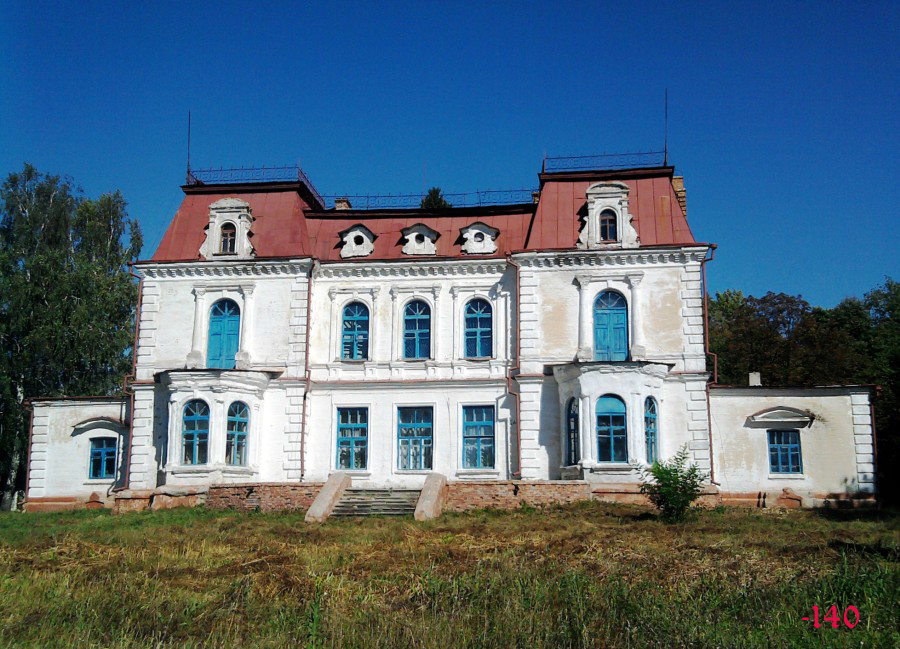 Палац, Спичинці, вул.Центральна